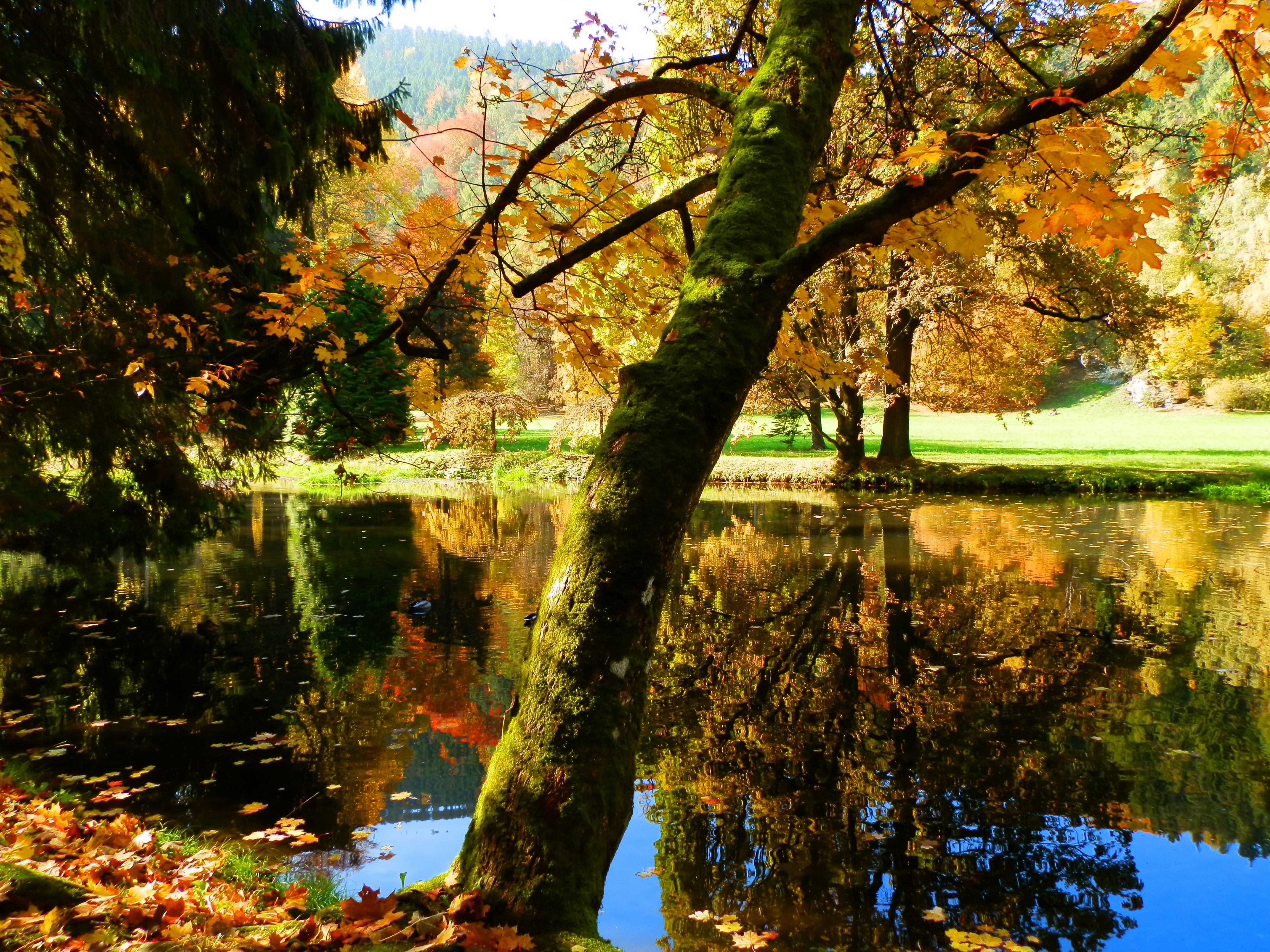 Turčianska Štiavnička